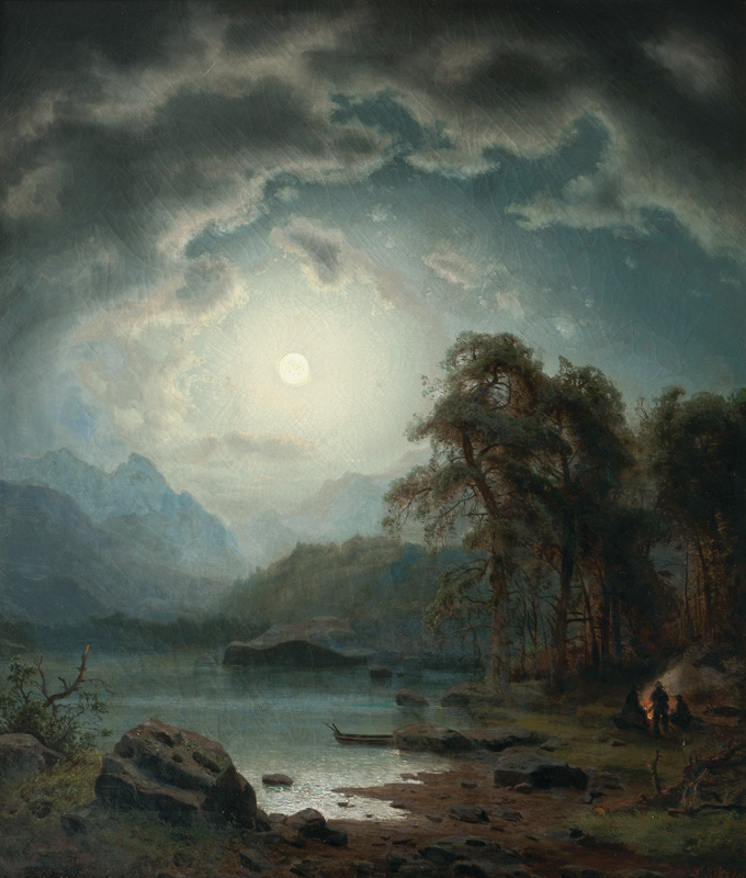 Nachtlandschaft mit Jägern am Feuer, Öl auf Leinwand, 80 x 69 cm